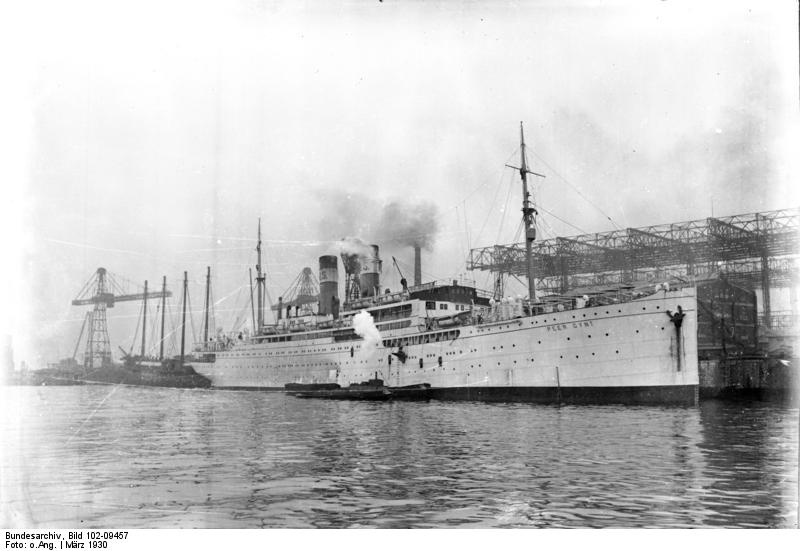 Der bekannte Vergnügungsdampfer "Oceana" früher "Peer Gint" ist in der Nähe der Insel Tenedos im Aegäischen Meer auf eine Sandbank geraten. Bergungsdampfer sind zur Hilfeleistung ausgefahren. Alle Fahrgäste befinden sich wohlauf. Der Dampfer "Oceana" gehört der Hamburg-Amerika-Linie, und befand sich auf einer Vegnügungsreise nach Constantionopel.